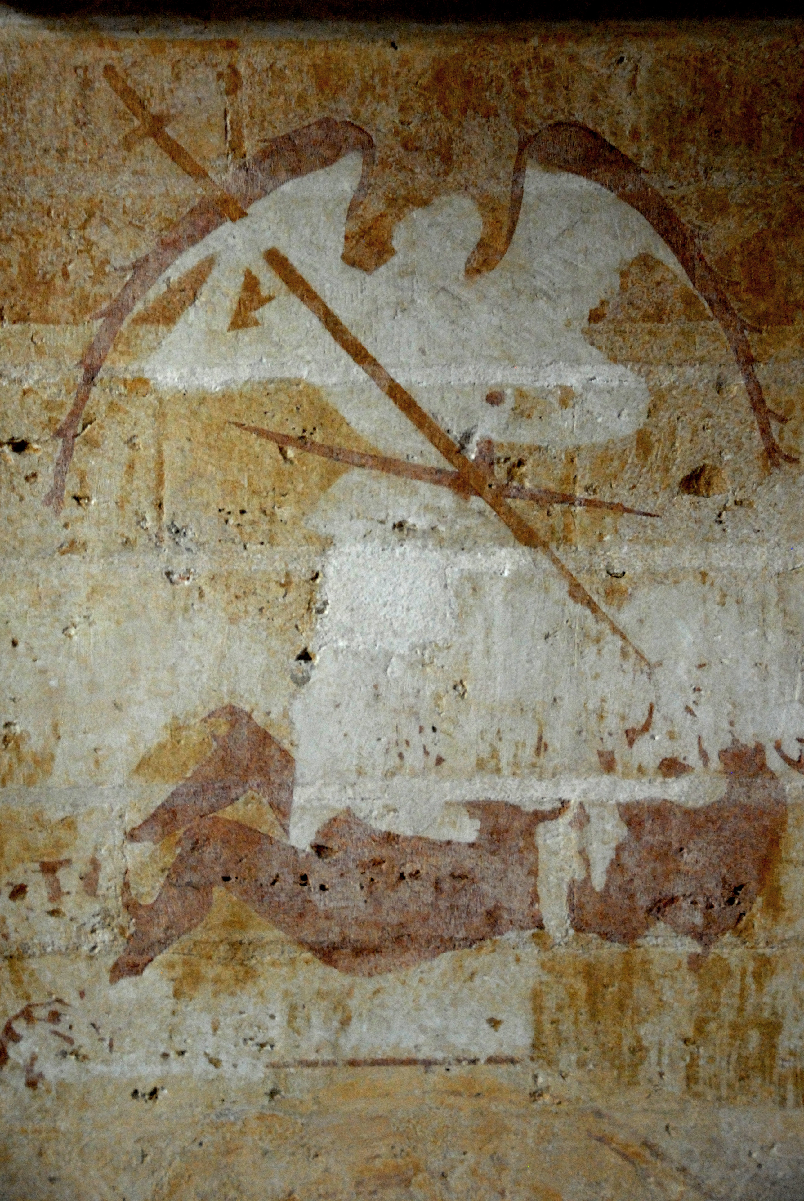 Kirche,Schiff,Fresko, Wand z. Chor, Erzengel Michael